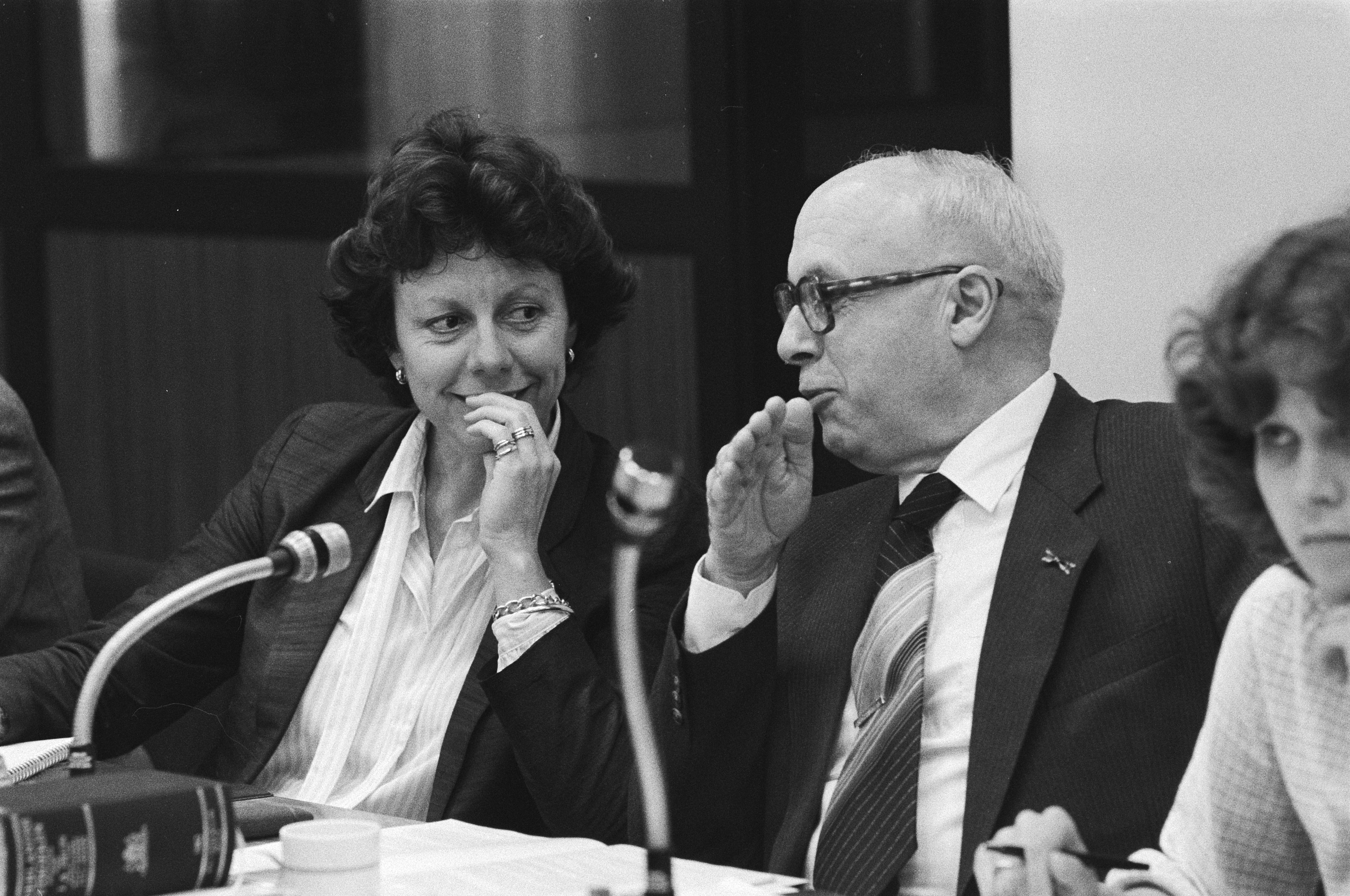 Collectie / Archief : Fotocollectie Anefo Reportage / Serie : Vergadering van de Kamercommissie van Verkeer en Waterstaat over het tarievenplan openbaar vervoer Beschrijving : Minister Smit-Kroes (l) en commissievoorzitter Van Dis (r) Datum : 9 mei 1983 Locatie : Den Haag, Zuid-Holland Trefwoorden : commissies, ministers, openbaar vervoer, prijsafspraken, voorzitters Persoonsnaam : Dis, C.N. van, Smit-Kroes, Neelie Fotograaf : Croes, Rob C. / Anefo Auteursrechthebbende : Nationaal Archief Materiaalsoort : Negatief (zwart/wit) Nummer archiefinventaris : bekijk toegang 2.24.01.05 Bestanddeelnummer : 932-5848